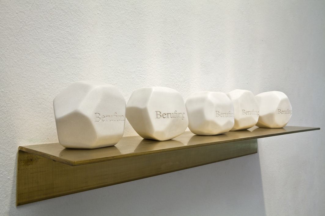 BERUFUNG (La pietra di David) Màrmol, inscripción láser y soporte de latón 70x6x22cms 2010